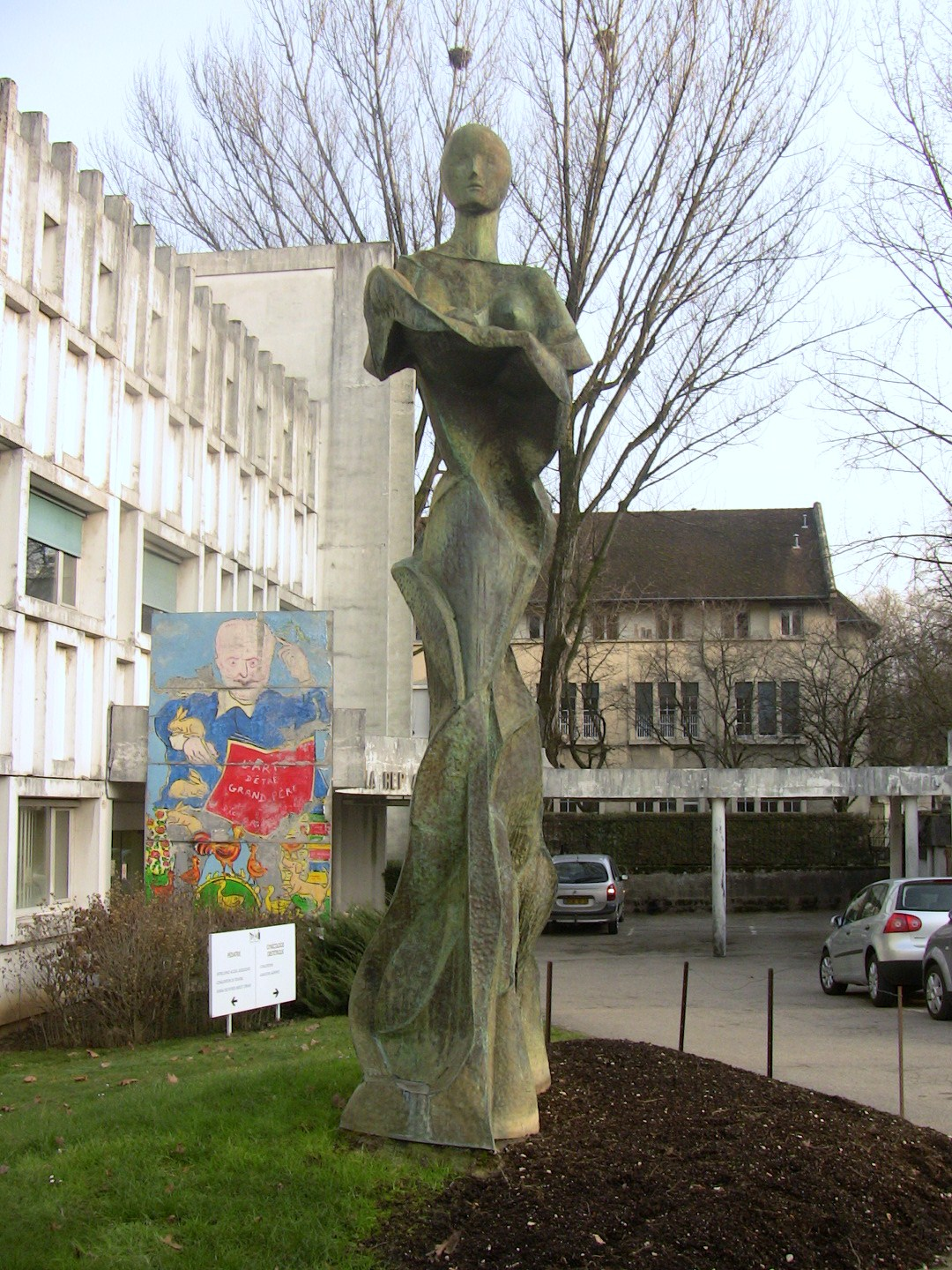 Statue d'une femme à l'enfant, devant ma maternité de Besançon (Doubs, France).